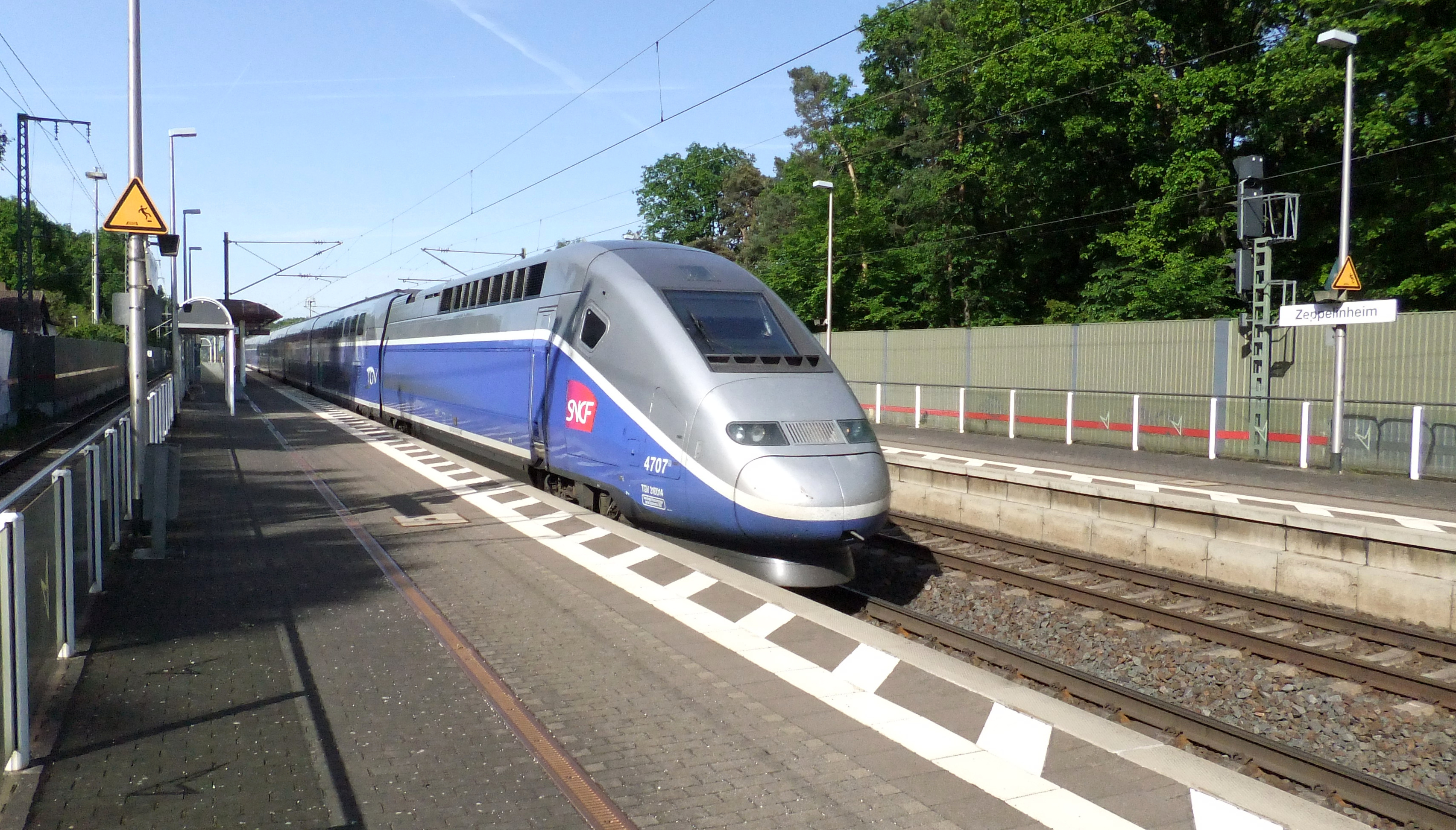 TGV Duplex (Tz 4707) durchfährt den Neu-Isenburg-Zeppelinheimer Bahnhof auf dem Weg von Frankfurt (Main) Hauptbahnhof nach Paris Gare de l’Est